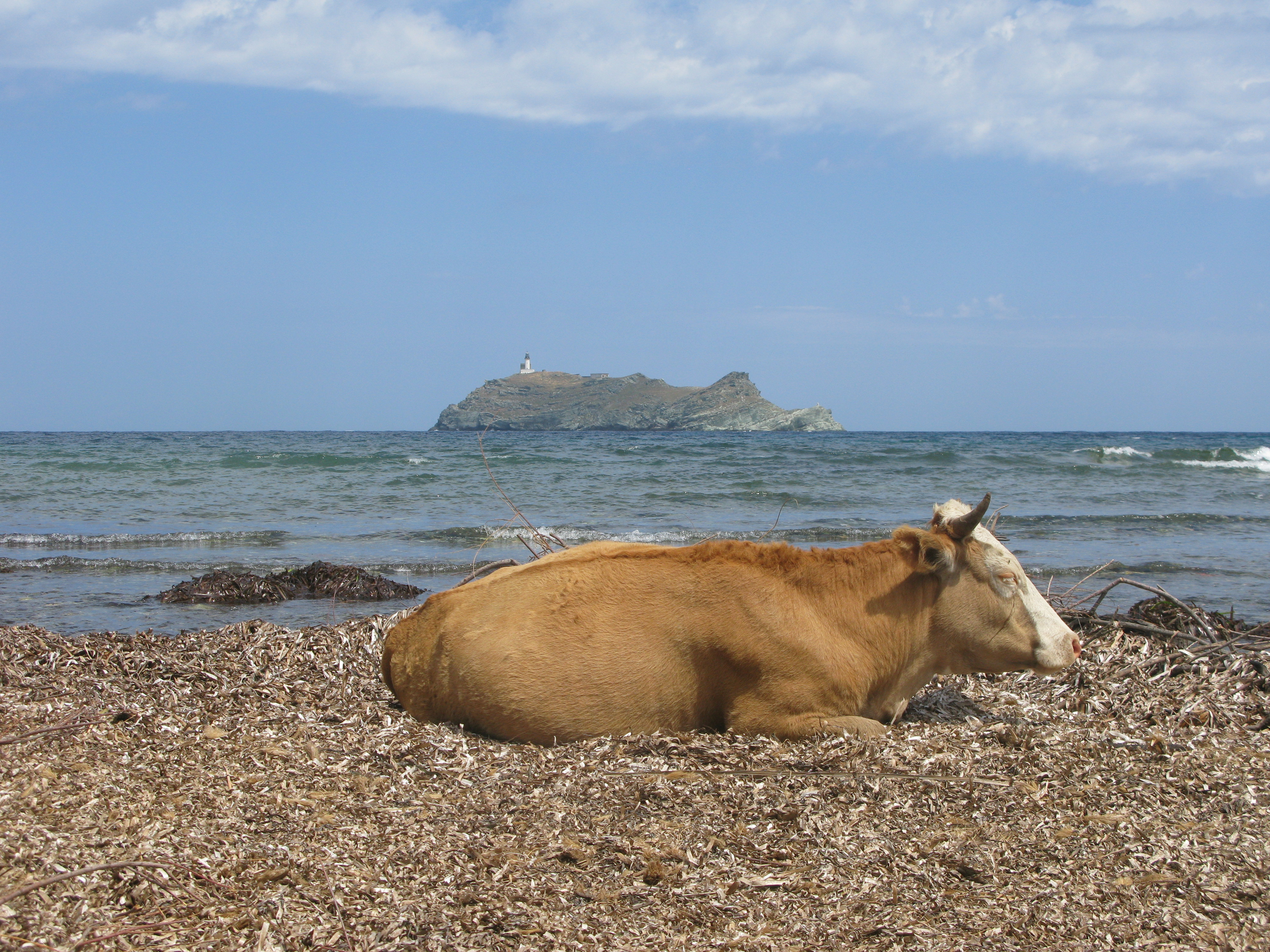 Vache (bos taurus taurus) de race corse sur la plage de Barcaggio, Cap Corse. Et ile de la Giraglia